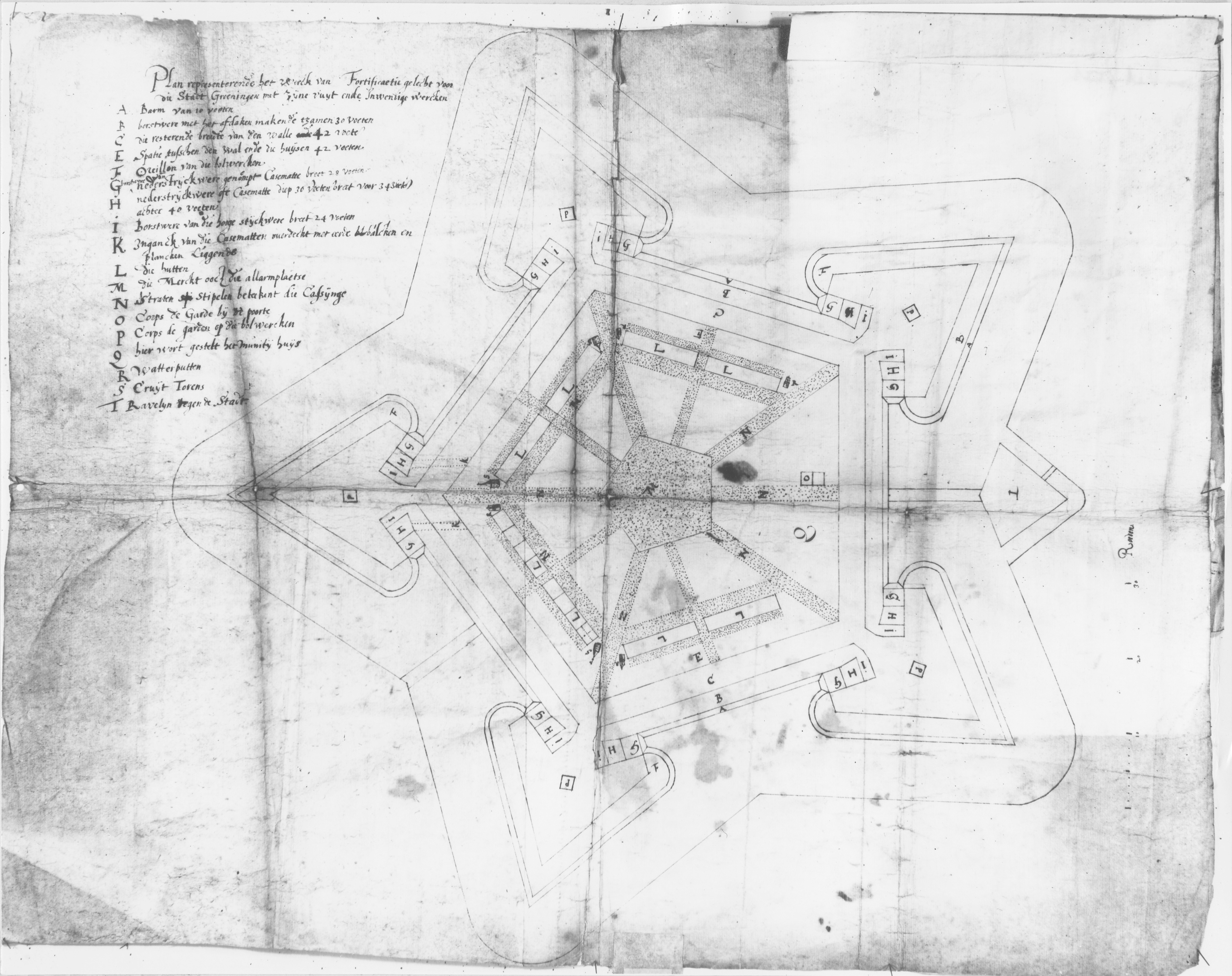 Johan van Rijswijck's ontwerp van het Statenkasteel bij Groningen